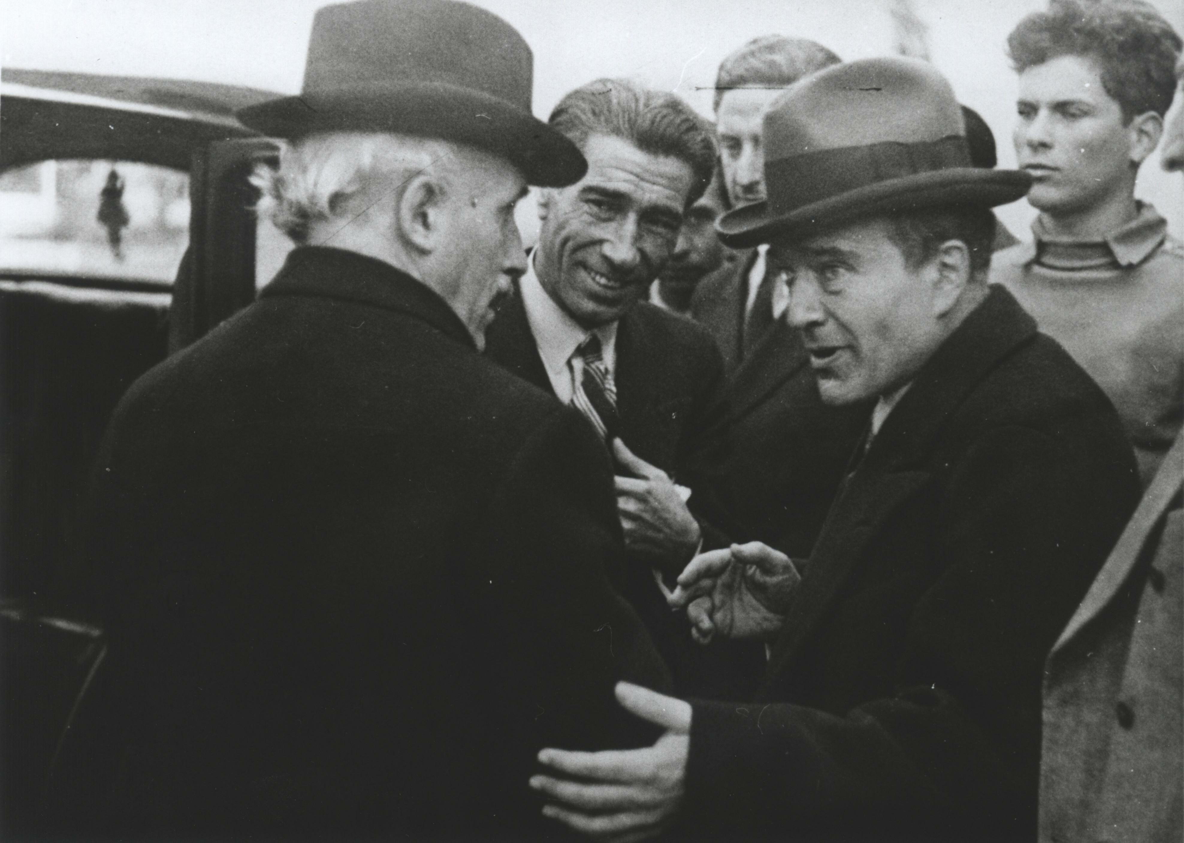 תמונה משותפת של ברוניסלב הוברמן, משה שלוש וארטורו טוסקניני